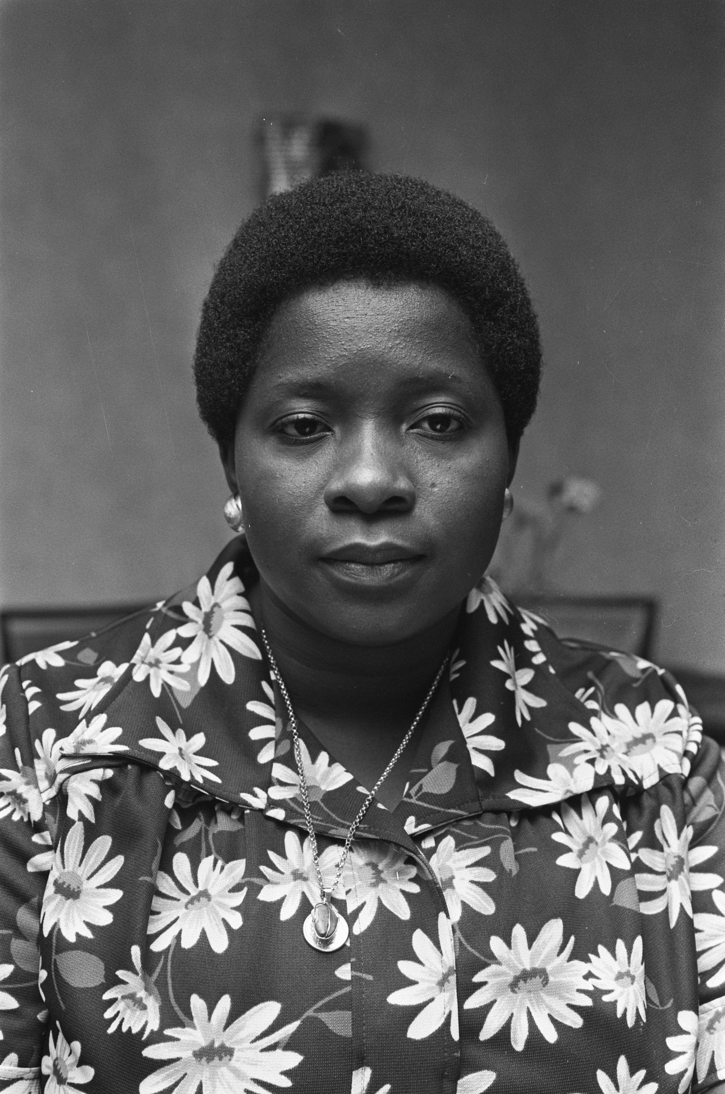 Collectie / Archief : Fotocollectie Anefo Reportage / Serie : [ onbekend ] Beschrijving : Surinaams Statenlid mevrouw Liesdek-Aarke in ons land Datum : 3 oktober 1975 Fotograaf : Verhoeff, Bert / Anefo Auteursrechthebbende : Nationaal Archief Materiaalsoort : Negatief (zwart/wit) Nummer archiefinventaris : bekijk toegang 2.24.01.05 Bestanddeelnummer : 928-1855